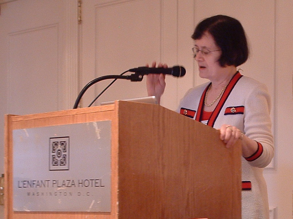 Barbara Simons